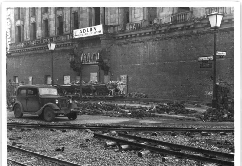 Berlin, Unter den Linden, Hotel "Adlon" Illus Kümpfel 13.2.50 Weltbekannte Berliner Hotels. Die großen Berliner Hotels haben den Krieg nicht überstanden und heute, 5 Jahre nach dem Krieg, zeigen nur noch Ruinenfragmente und Trümmer an, wo früher einmal große Gebäude Reisenden aus allen Teilen der Welt Unterkunft gewährten. UBz: Hotel "Adlon" Unter den Linden. 5372-50